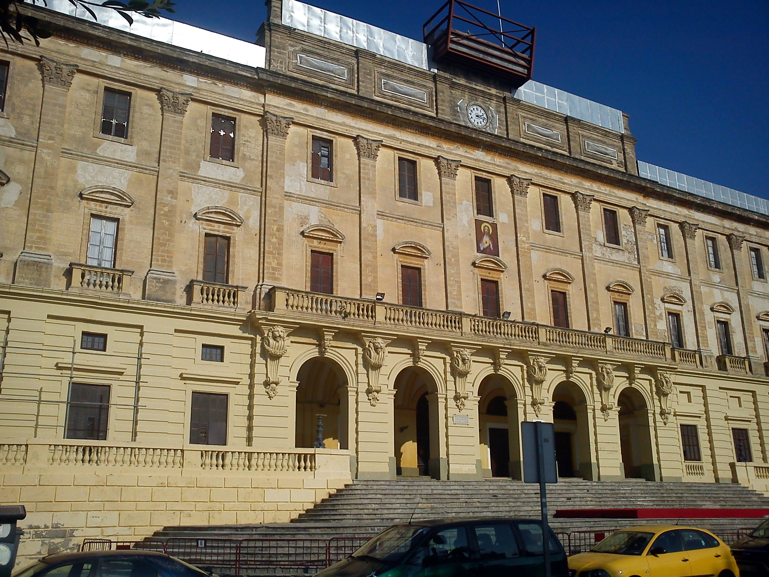 Como puede verse esta aun en proceso de restauración